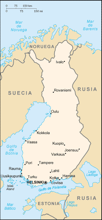 Fuente original: CIA World Factbook. Traducido por Wesisnay y pesa menos categoría:Mapas de Europa (imagen)